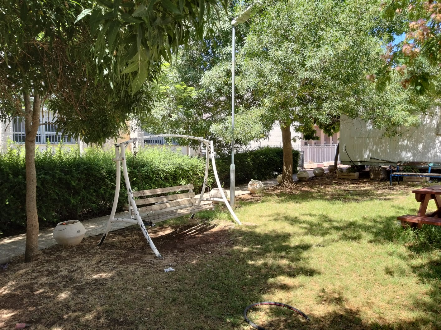 נדנדה לרווחת התלמידות